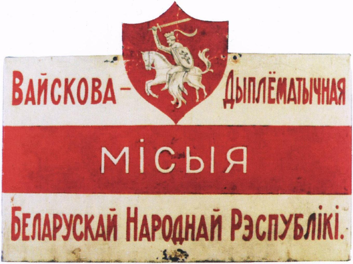 Беларуская (тарашкевіца): Шыльда вайскова-дыпляматычнай місыі Беларускай Народнай Рэспублікі (БНР) у Латвіі і Эстоніі.